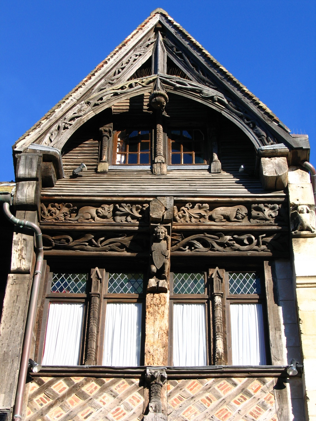 Etretat, détail sur le décor d'une maison